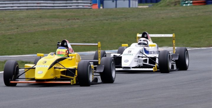 Rennen